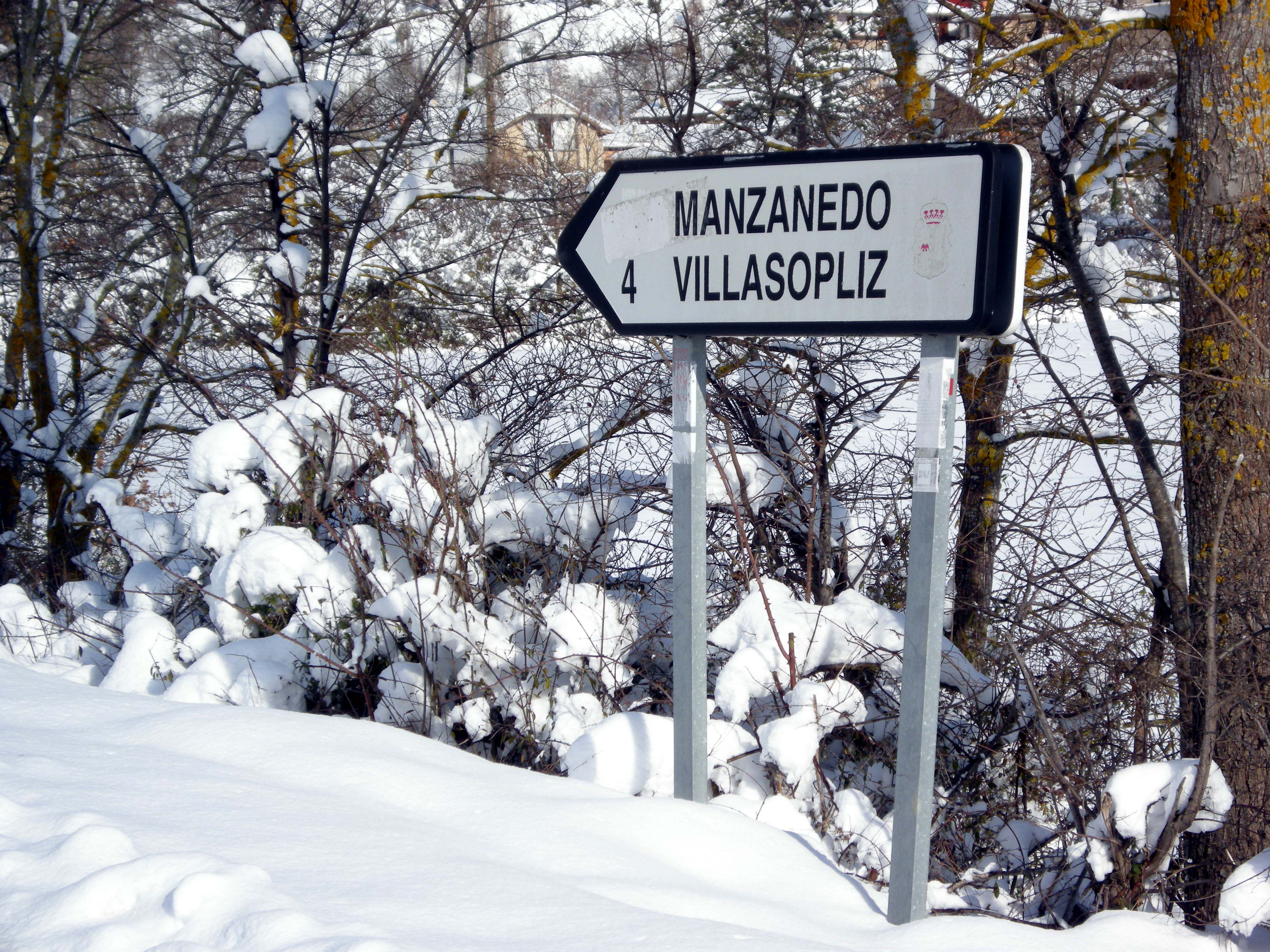 Entrada a Manzanedo